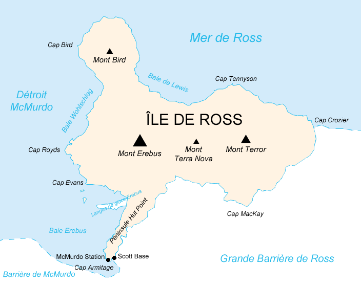 Île de Ross